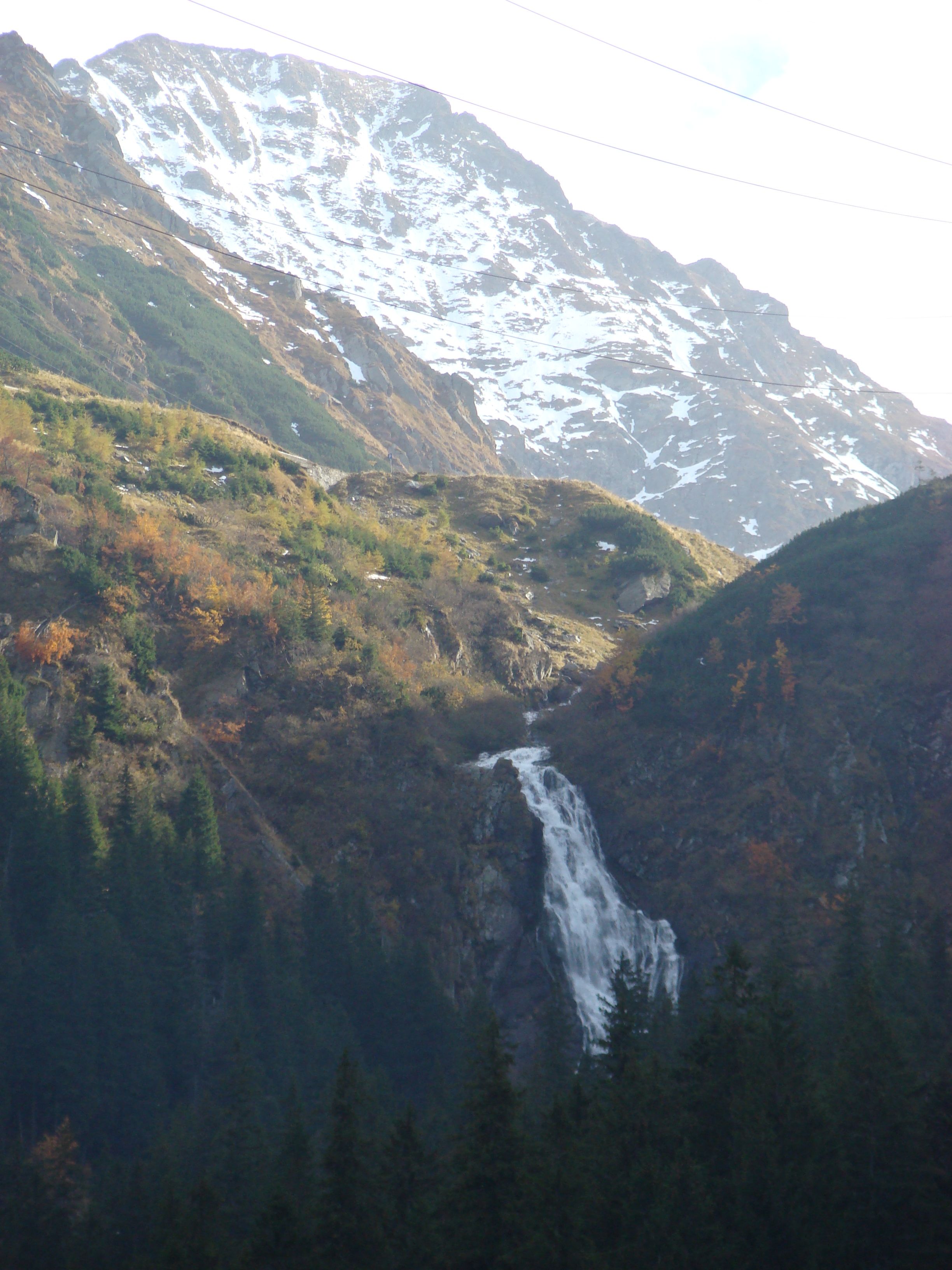 DN 7c (Bâlea Cascadă-Sibiu)